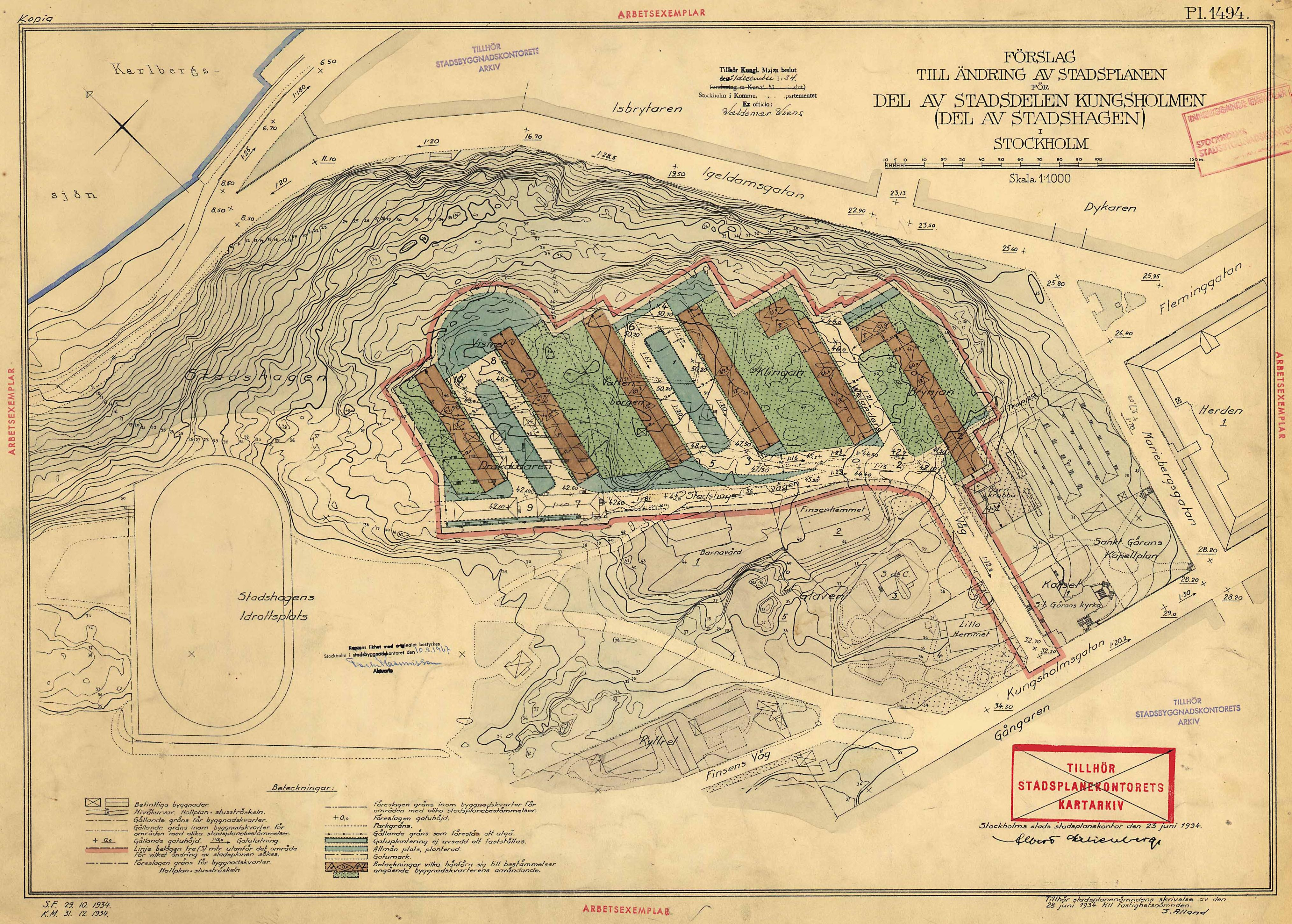 Förslag till stadsplaneändring för Stadshagen